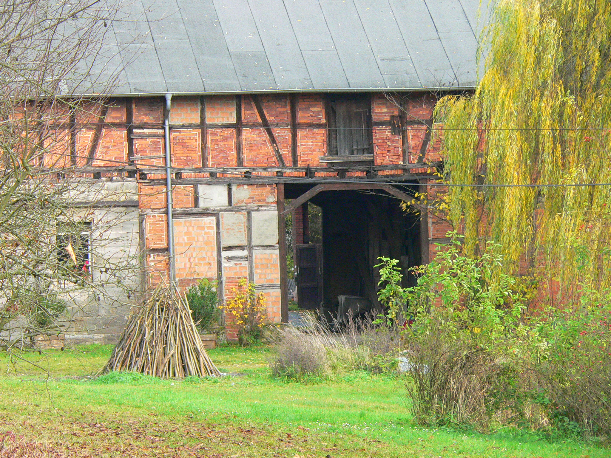 Coburg - Neudörfles (Bayern), Scheune des Gutshofs